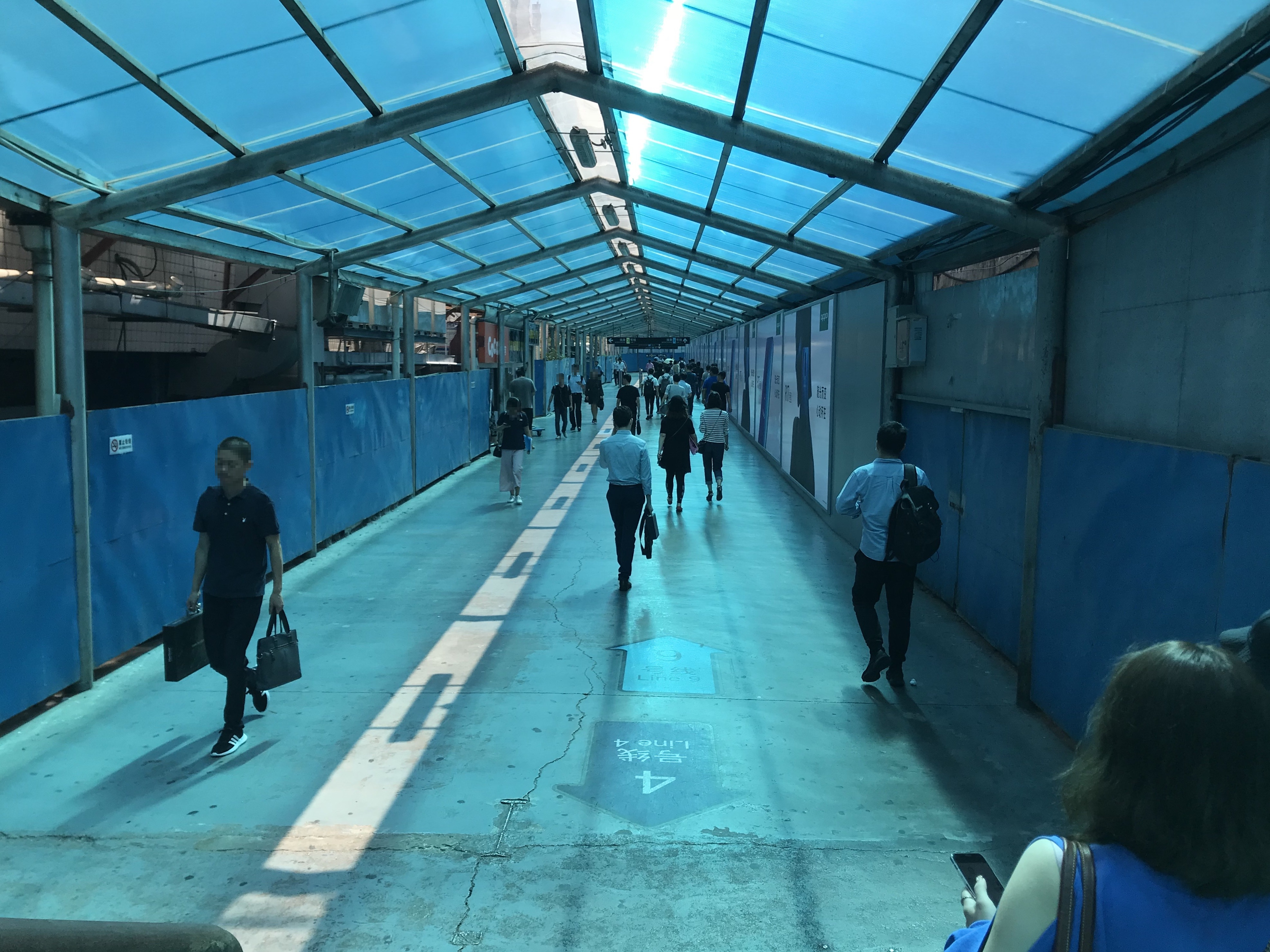 宜山路駅の乗り換え通路